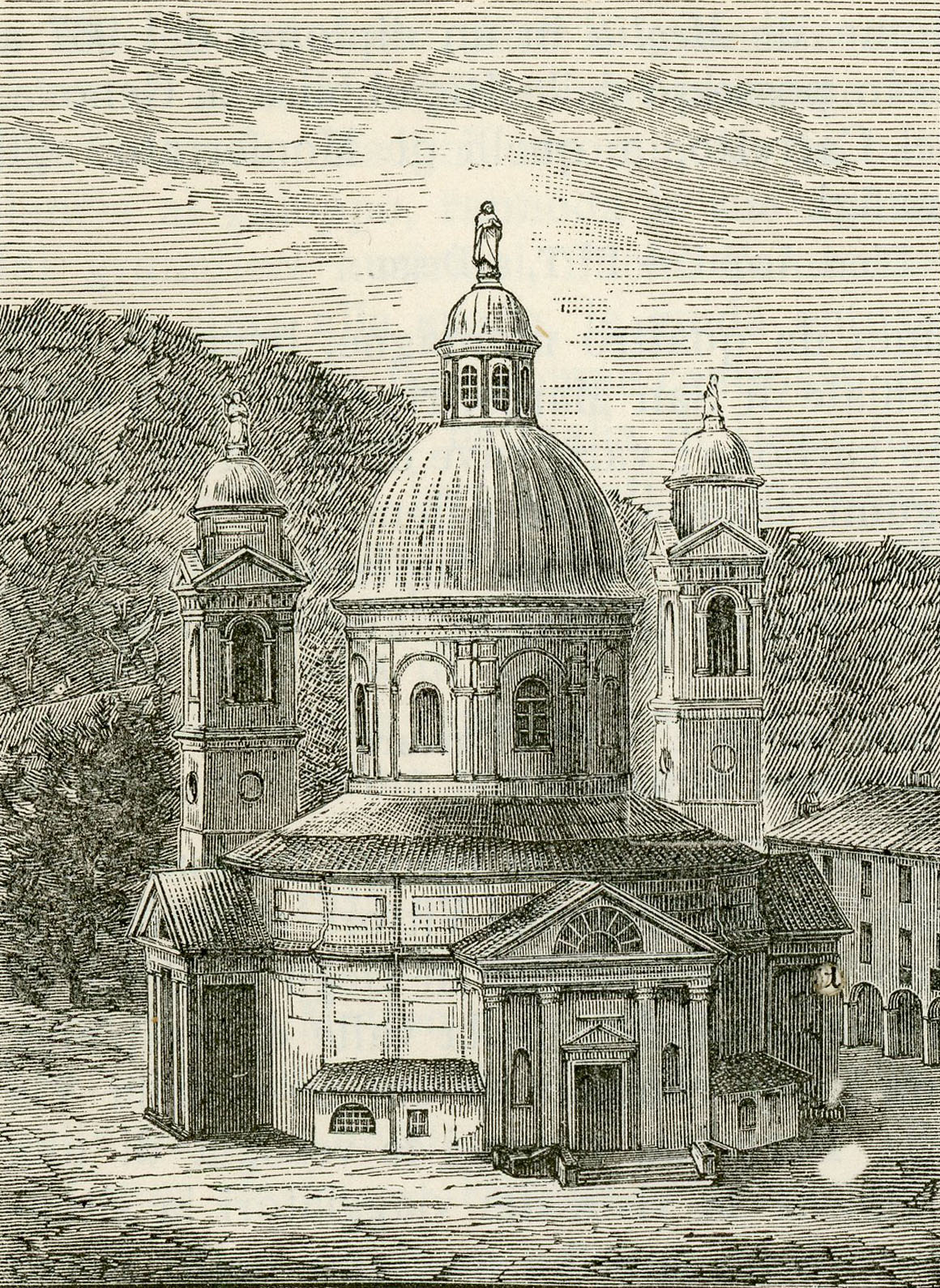 Millesimo: Santuario della Madonna del Deserto (xilografia).